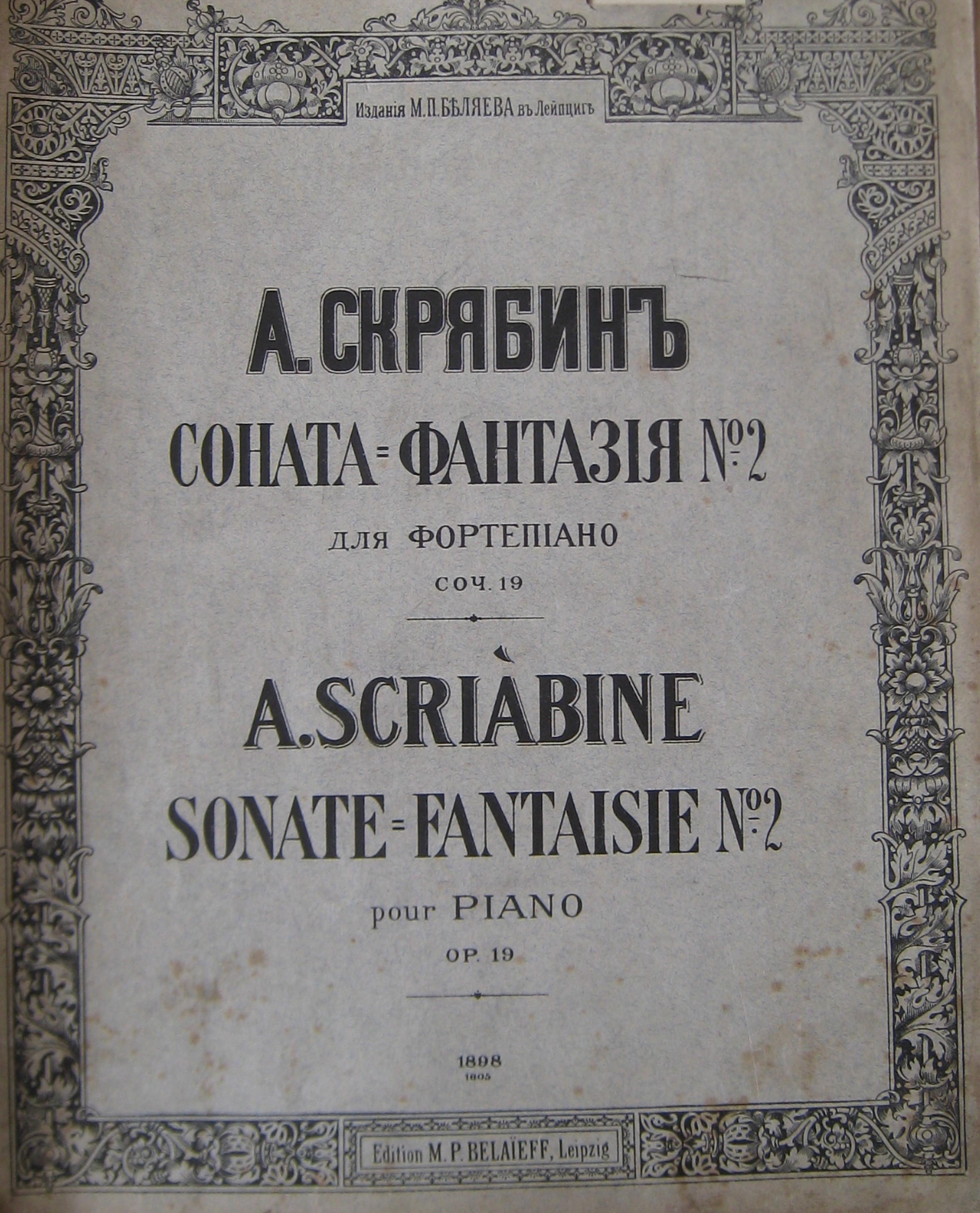 Original Erstausgabe 1898